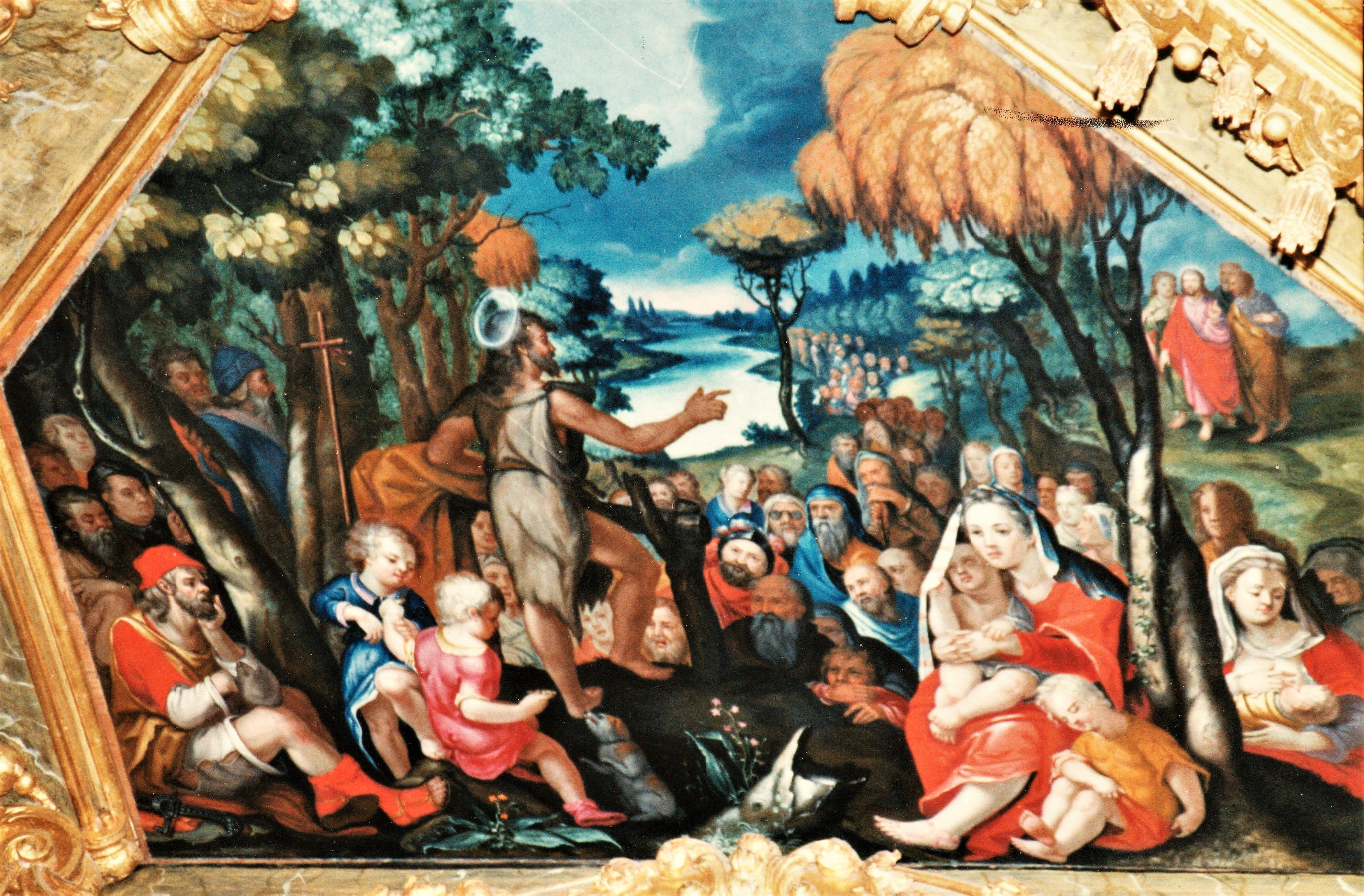 Schlosskirche Weilburg, Gemälde im Schalldeckel der Kanzel: Predigt Johannes des Täufers